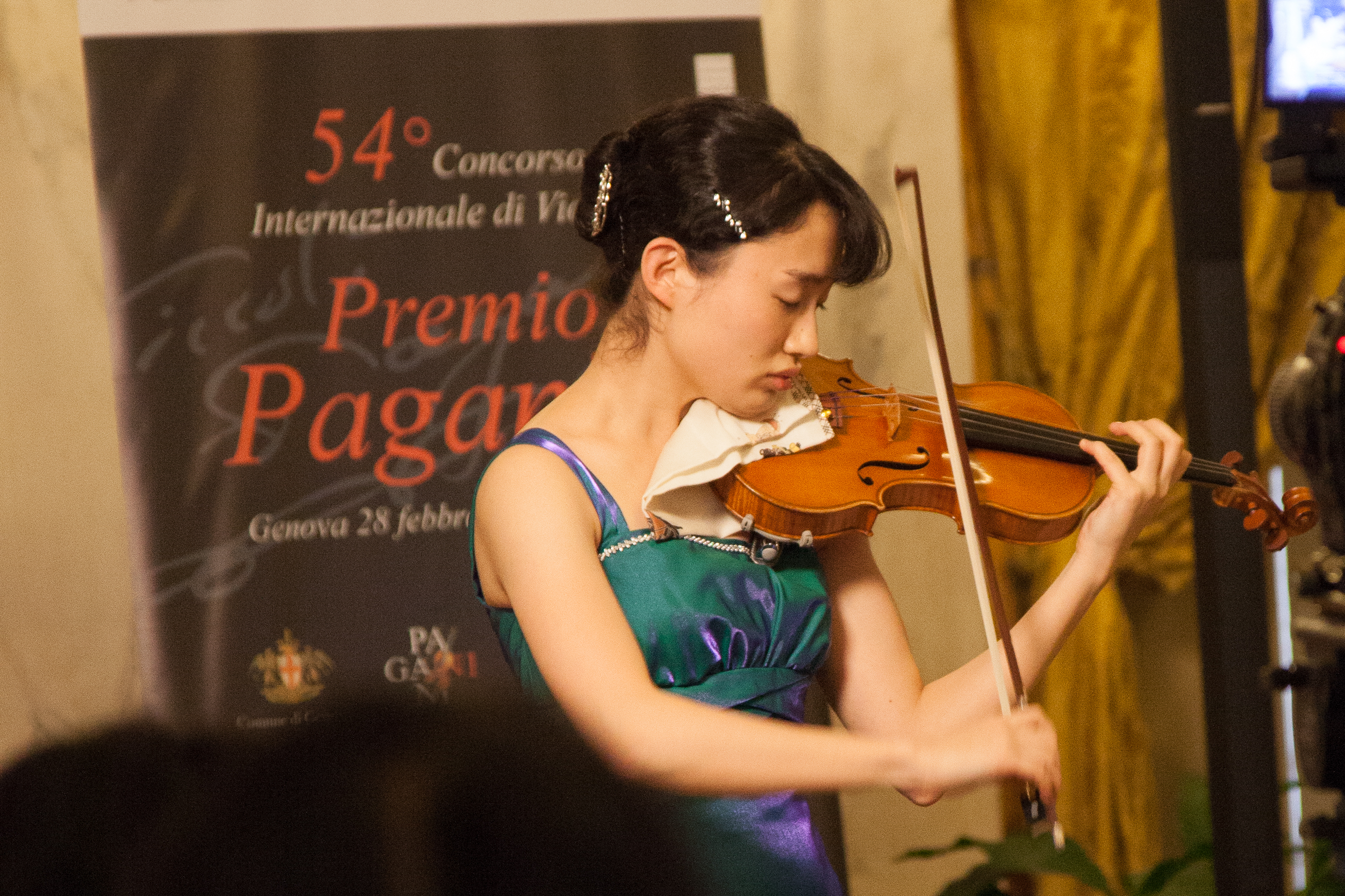 La violinista Fumika Mohri alle prove preliminari del 54° premio Paganini